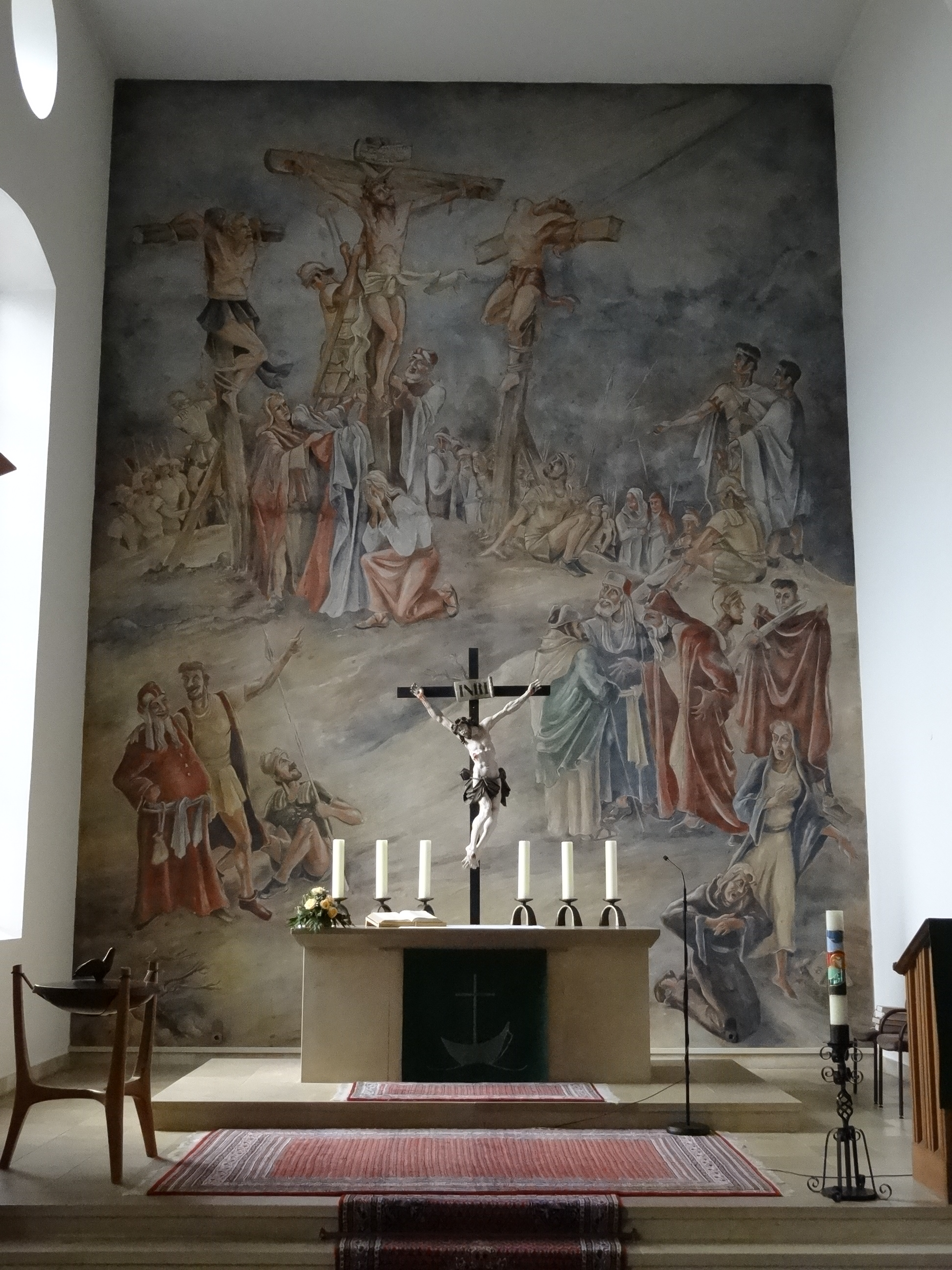 Evangelische Kirche Watzenborn-Steinberg